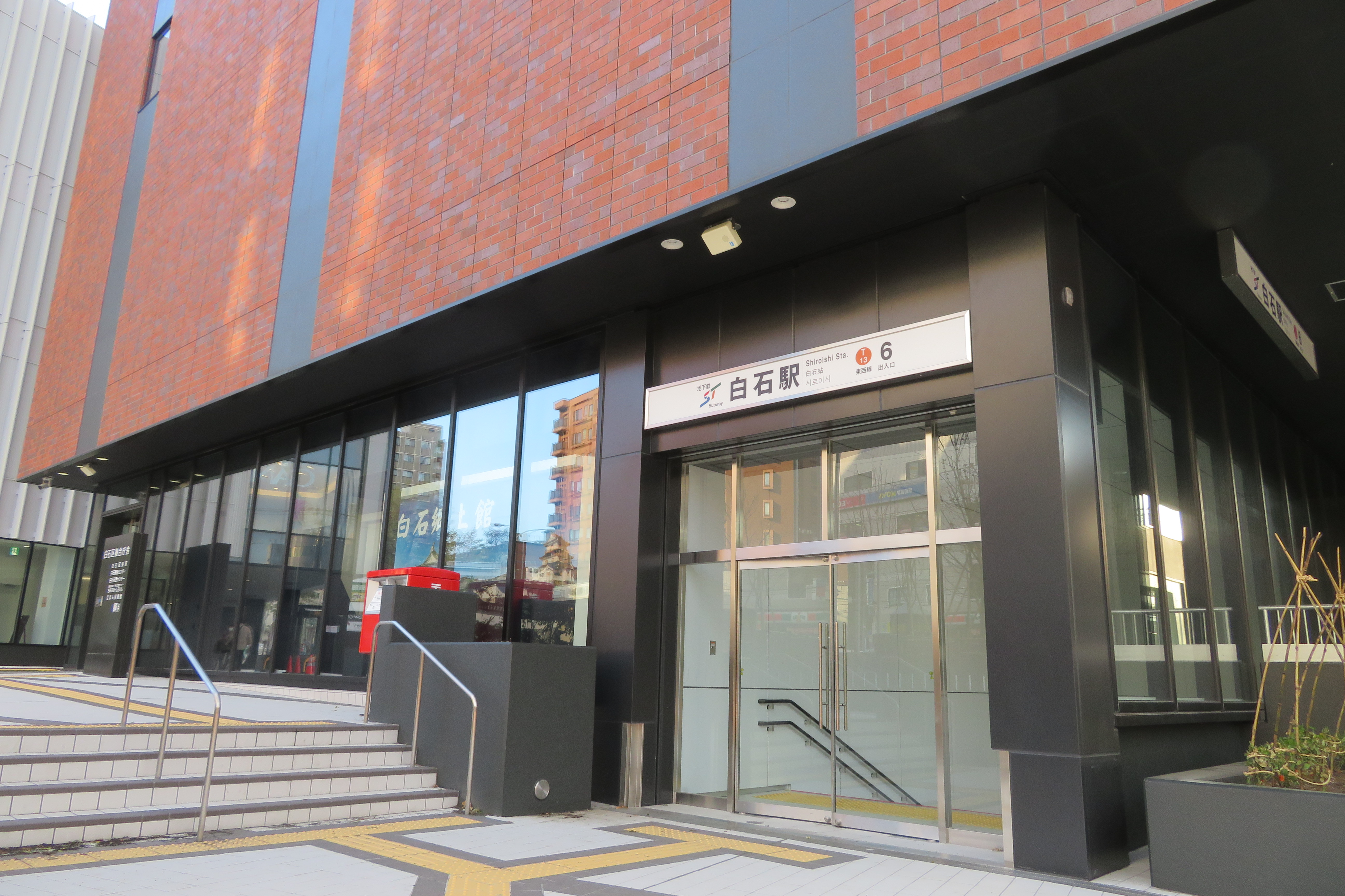 地下鉄白石駅6番出入口